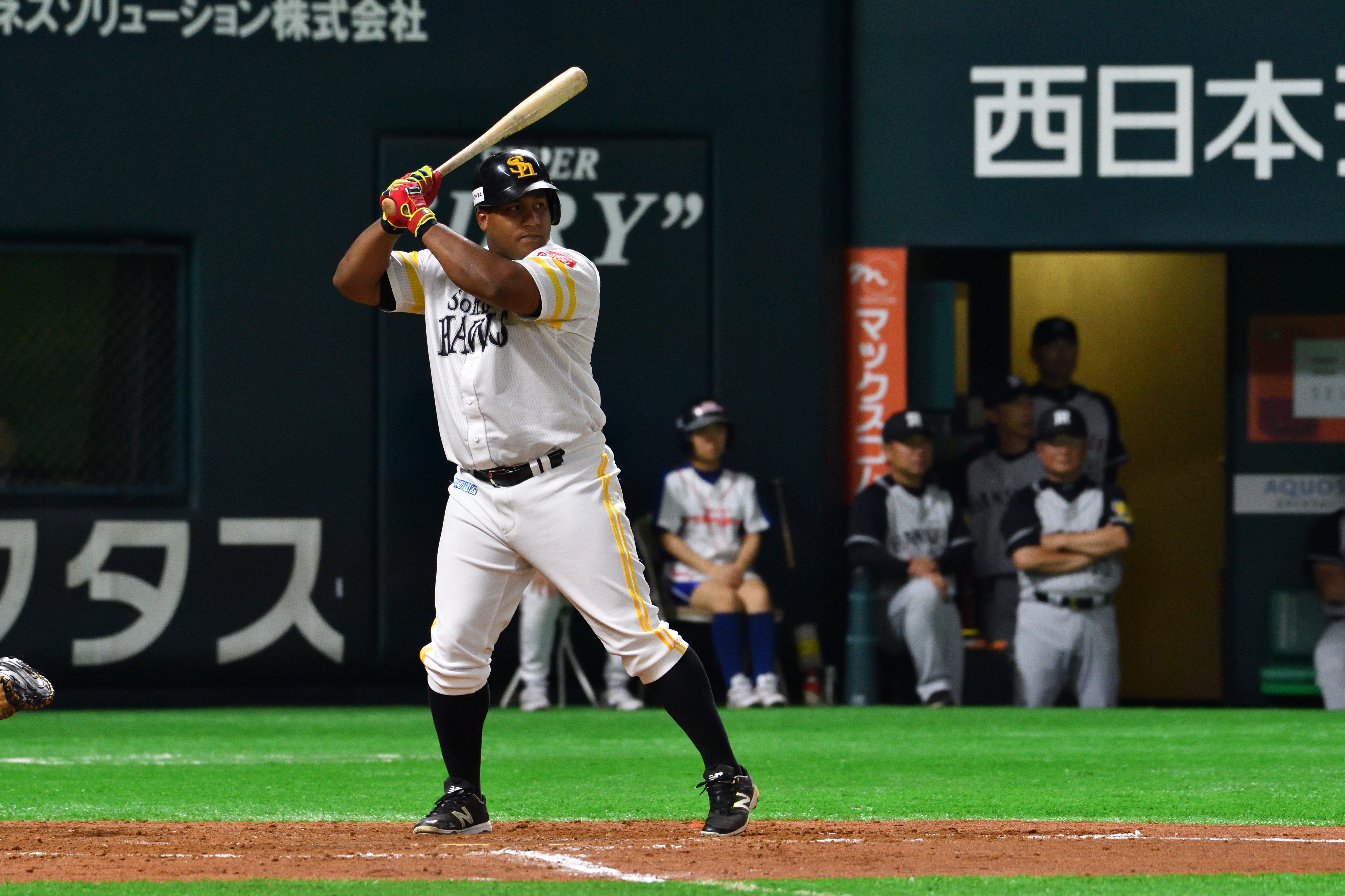 アルフレド・デスパイネ・ロドリゲス（Alfredo Despaigne Rodriguez ）キューバ出身の野球選手（外野手）。現在は、日本プロ野球・福岡ソフトバンクホークスに所属。